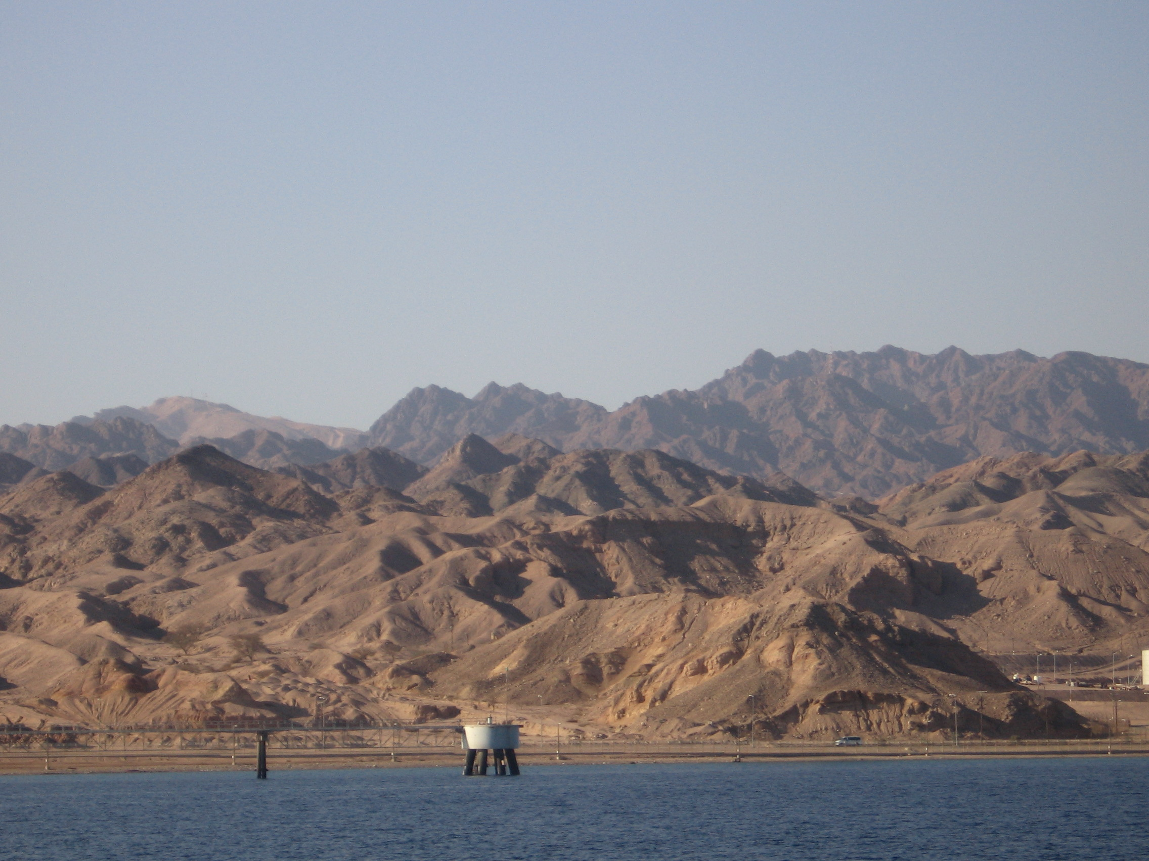 Eilat Mountains